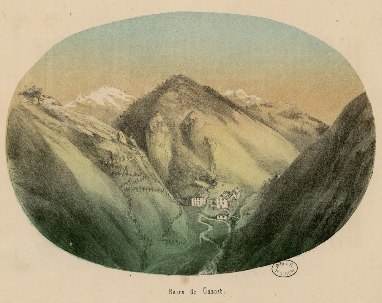 1 vignette lithographiée au titre, 1 carte des Vallées du Lavedan et 7 lithographies en couleurs attribuées à différents artistes Typographie de J.-A. Fouga (Tarbes) Ancely, René (1876 - 1966). Possesseur